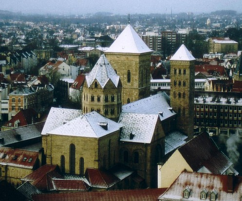 Osnabrück, Dom St. Peter, Gesamtansicht Nordost